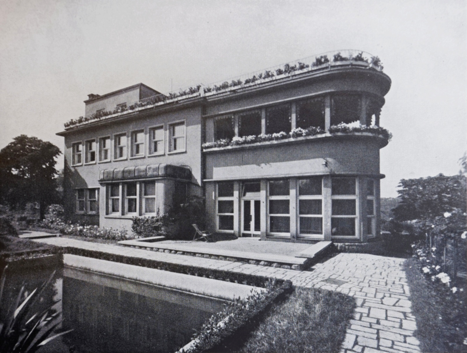 Berthold Schwarz: Vila Karla Friedmanna, čp. 850, Praha 4 - Nusle, Na Květnici 20.